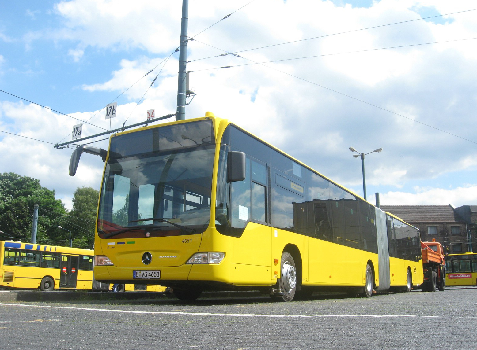 4651 der EVAG auf dem Betriebshof Stadtmitte